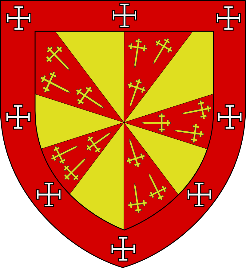 Armes de la famille de Havrech, seigneurs de Presles (branche bâtarde d'Enghien). Blasonnement: Gironné de gueules et d'or, le gueules semé de croisettes au pied fiché d'or ; à la bordure de gueules, chargée de huit croix potencées d'argent. Source: J.F.A.F Azevedo Coutinho y Bernal, Généalogie de la famille de Coloma, p. 358, Louvain, 1777.